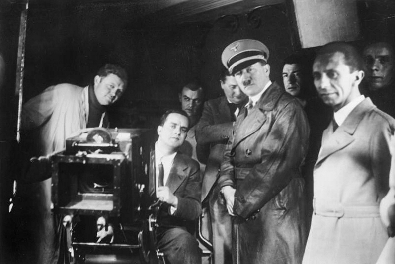 Besuch von Hitler und Goebbels bei der UFA Der Führer bei der Ufa. Der Führer und Reichskanzler stattete am 4. Januar in Begleitung des Reichspropagandaministers den Neubabelsberger Ateliers der Ufa einen Besuch ab und nahm dabei Gelegenheit, die Bauten des neuen Films "Barcarole" zu besichtigen. Generaldirektor Klitzsch führte den Reichskanzler und Minister Dr. Goebbels durch den Betrieb. Viel Interesse fand der soeben von der Ufa auf Anregung von Dr. Todt fertiggestellte Reichsautobahn-Film "Strasse ohne Hindernisse". UBz: den Führer und Dr. Goebbels während der Besichtigung der Ateliers, links Produktionsleiter Stapenhorst. Abgebildete Personen: Stapenhorst, Günther: Filmproduzent (GND 117212717) Hitler, Adolf: Reichskanzler, Deutschland Goebbels, Joseph: Reichsminister für Volksaufklärung und Propaganda, Gauleiter Berlin, Deutschland